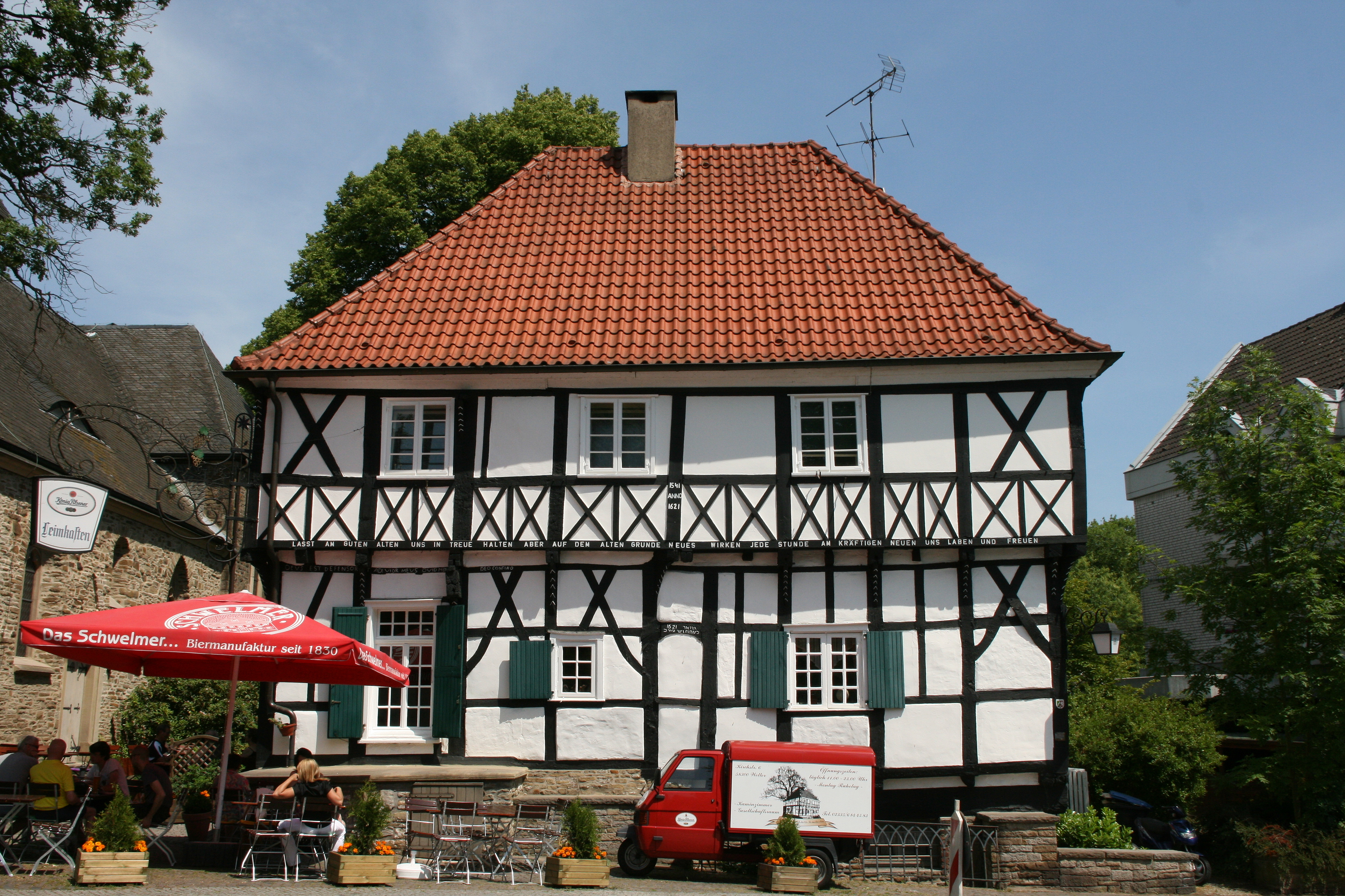 Restaurant Leimkasten, Kirchstraße 6 in Wetter (Ruhr)-Wengern